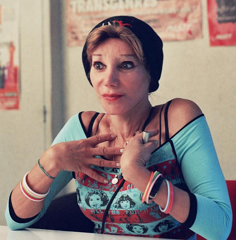 Camille Cabral, Conseillère municipale du 17e arrondissement de Paris, interviewée à son bureaux de PASTT.